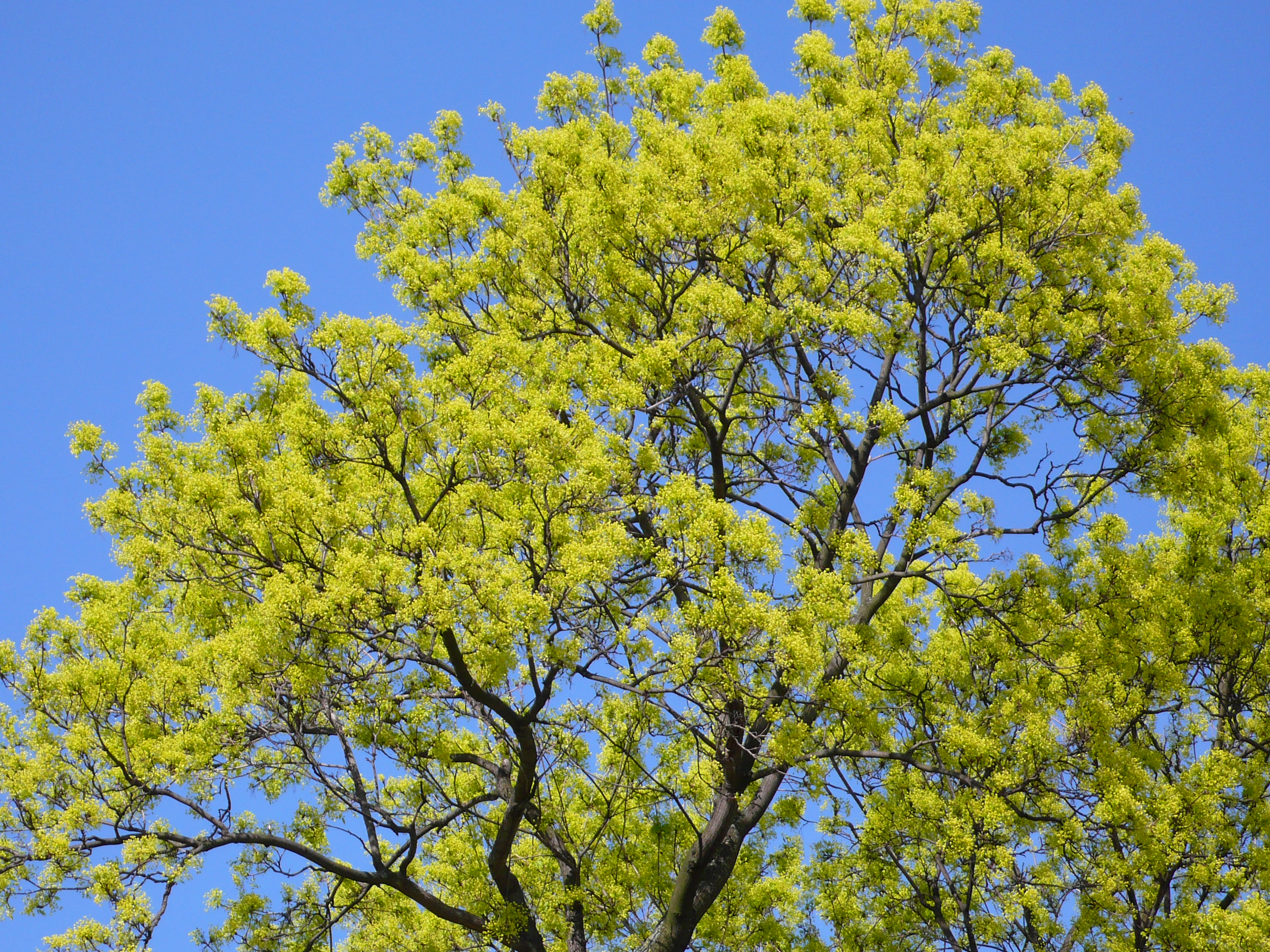 blühender Ahorn Acer platanoides